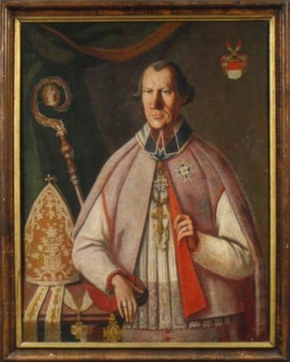 Propst Damian Hugo Philipp von Lehrbach, Porträt von Balthasar Mang